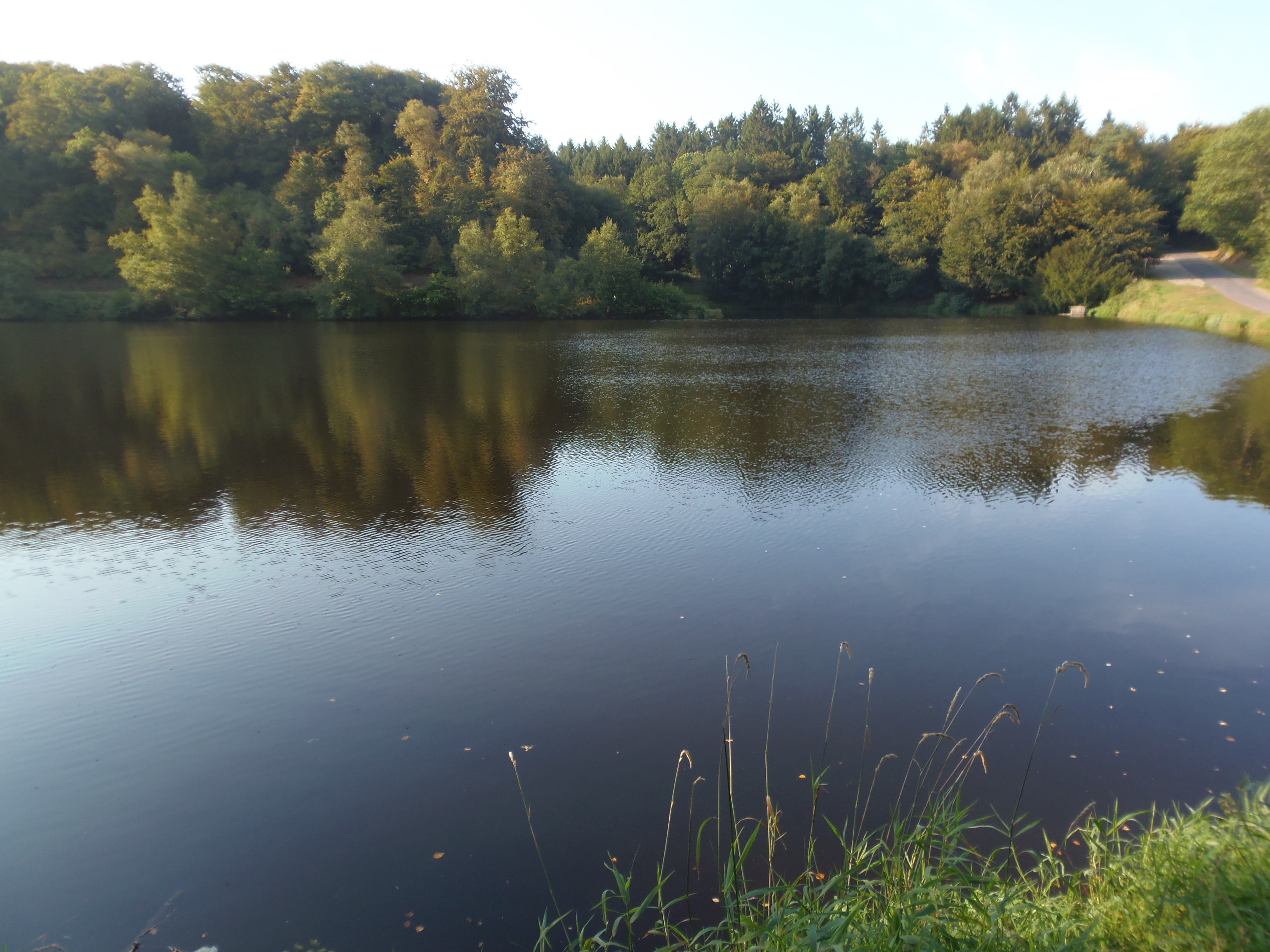 Saint-Sever-Calvados (Normandie, France). L'étang du Vieux Château.